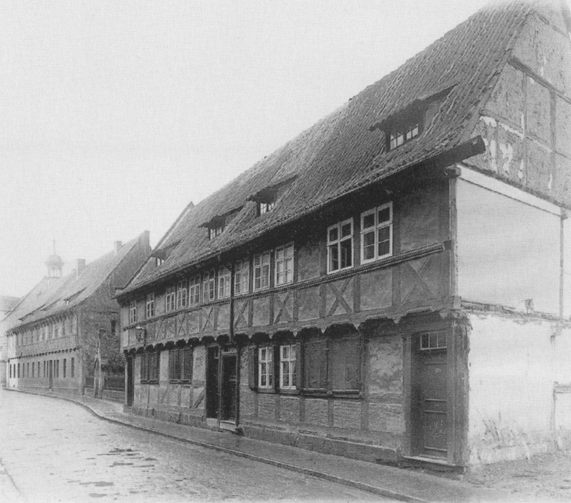 Heiligegeiststraße, Quedlinburg um 1900